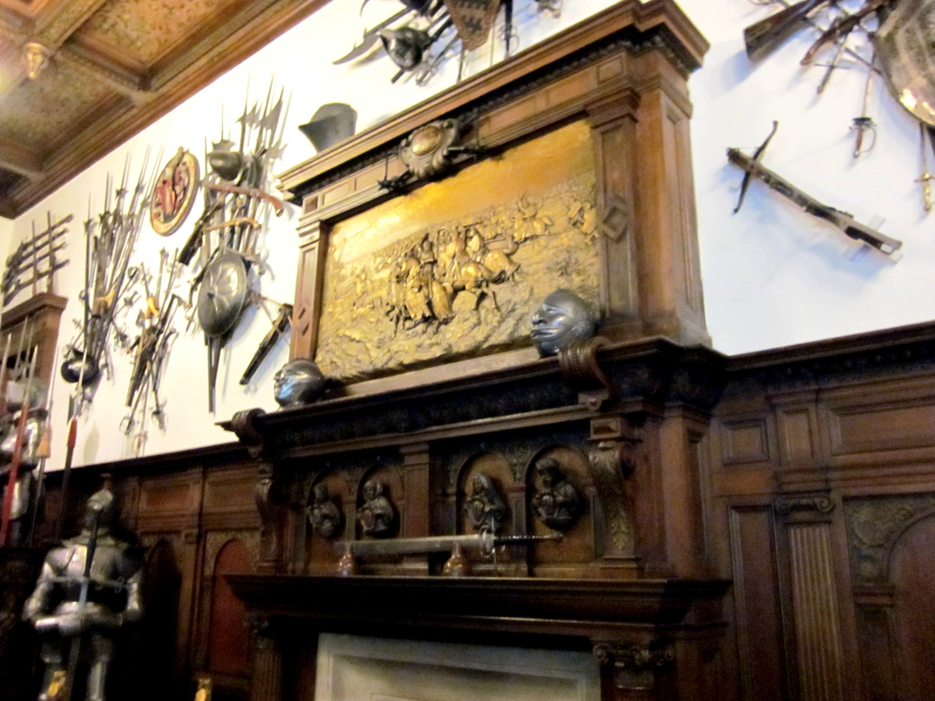 Ansamblul Castelului Peles PH-II-a-A-16696